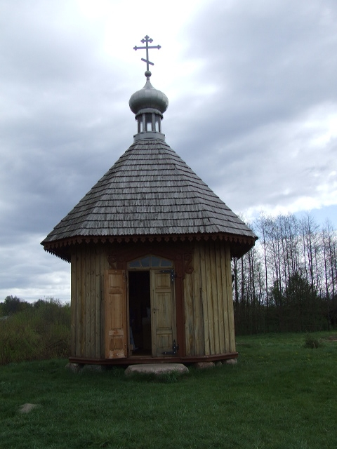 open air museum in Bialowieza, Poland; skansen w Białowieży